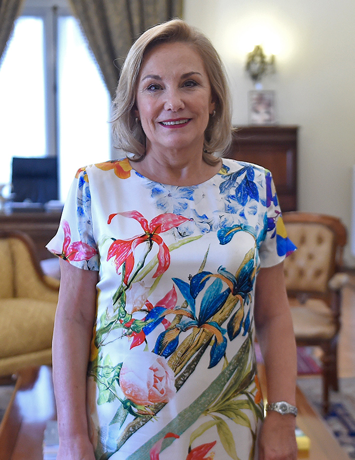 Foto oficial de Cecilia Morel en el segundo Gobierno de Sebastián Piñera